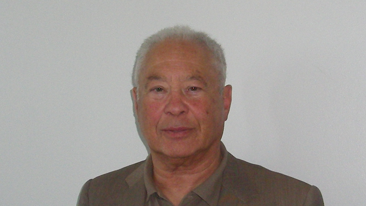 Porträtfotografie von Peter Kalmár, Herzchirurg in Hamburg